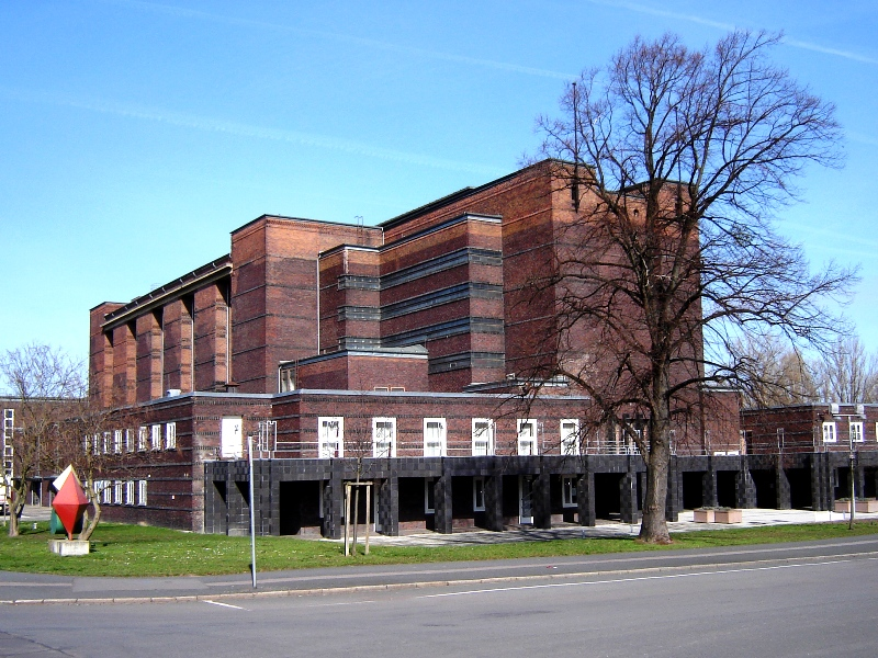 Stadthalle Magdeburg